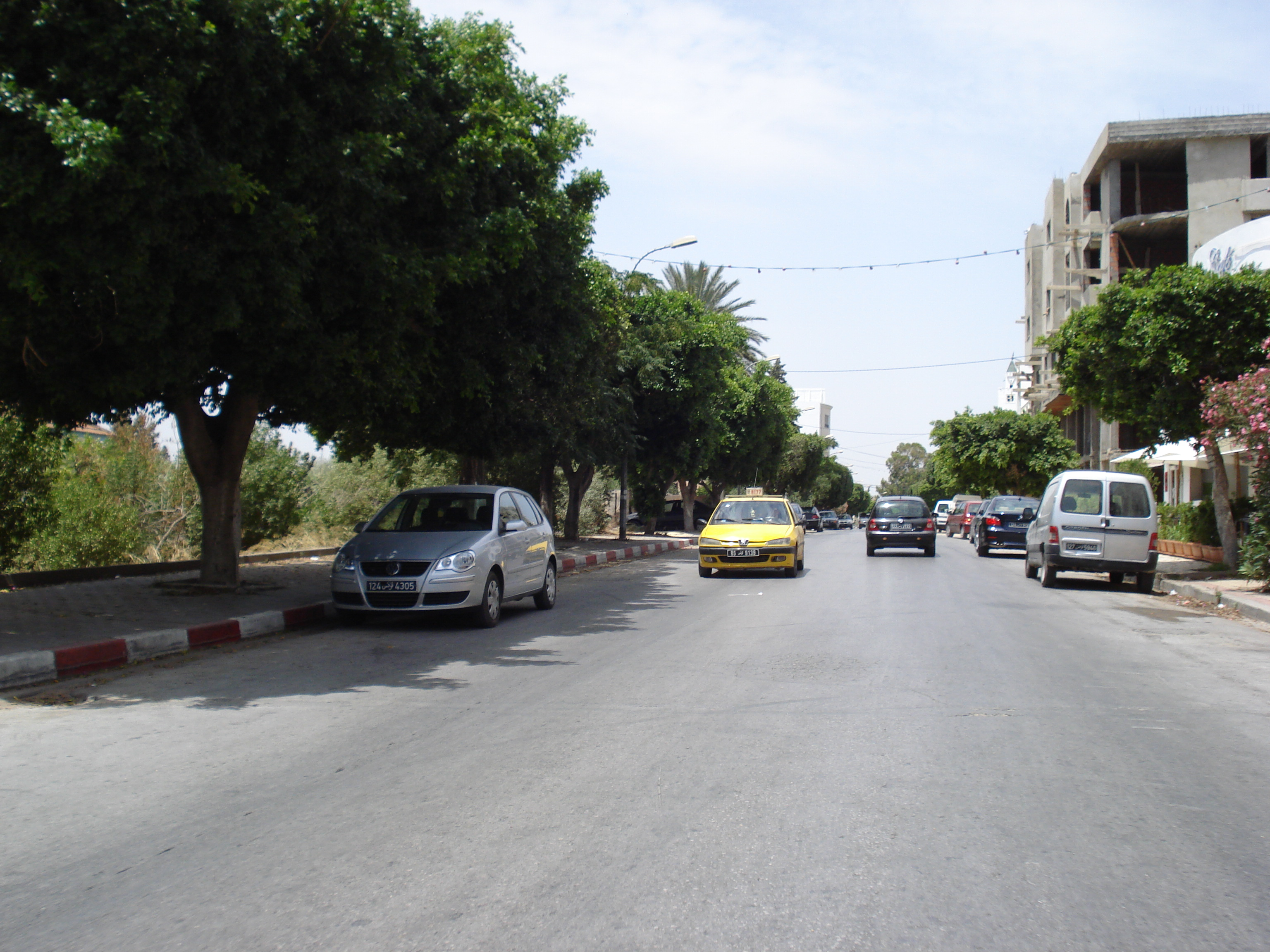 Avenue Habib-Bourguiba, Mégrine, Tunisie